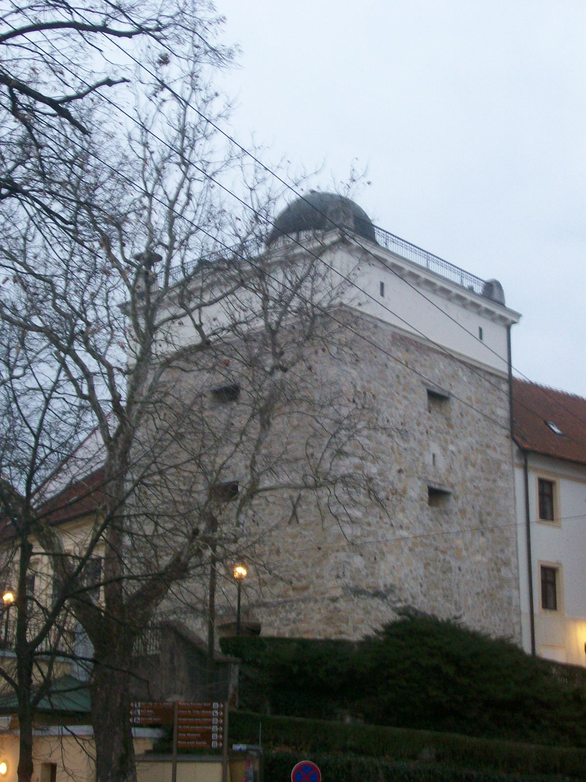 Zvjezdarnica Zagreb, Gornji grad